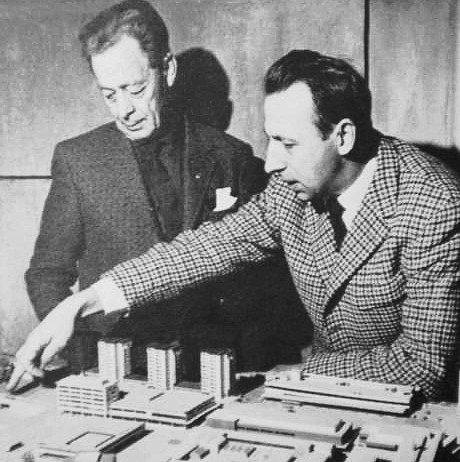 Albert Aronson (t.v.) och riksdagsman Oskar Lindkvist står vid en modell av Vällingby Centrum